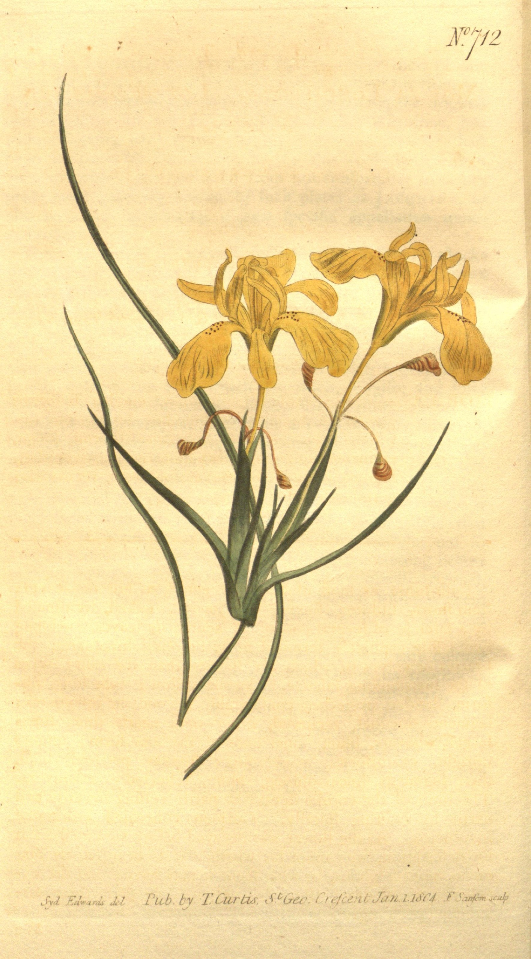 Ff/2